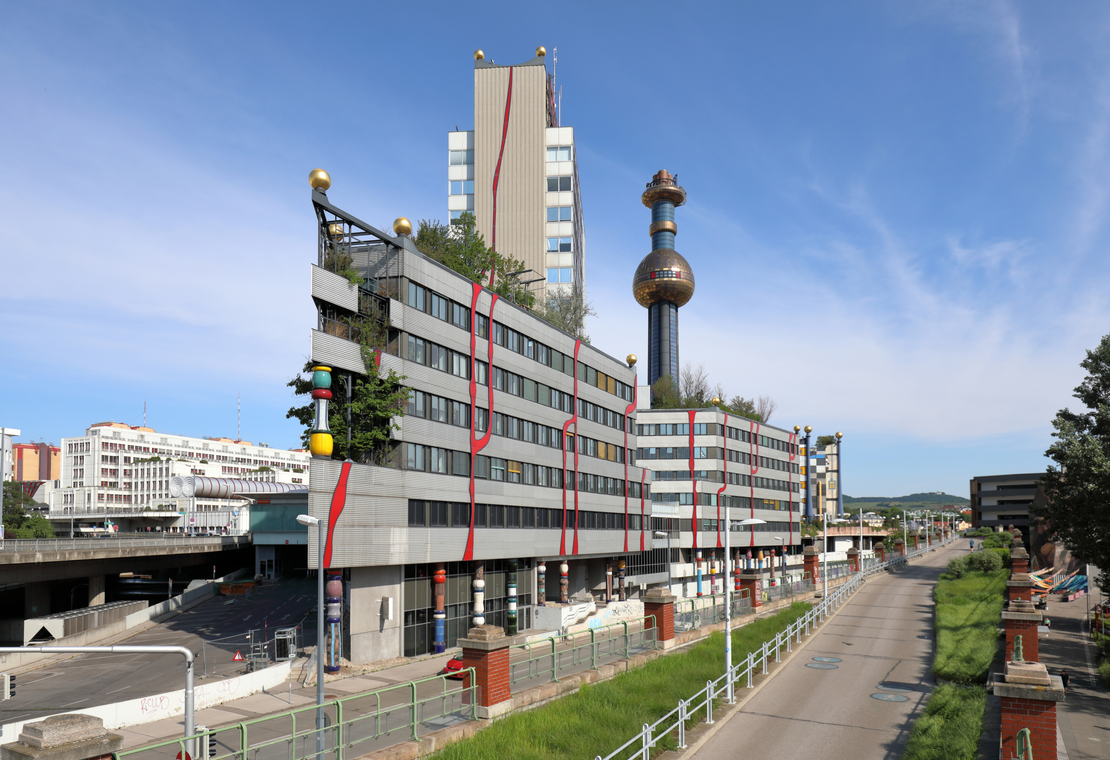 Südostansicht des Verwaltungsgebäude der Fernwärme Wien (Wien Energie AG) an der Adresse Spittelauer Lände 45 in der Spittelau, ein Ortsteil im 9. Wiener Gemeindebezirk Alsergrund und im Hintergrund der 126 m hohen Schlot der Müllverbrennungsanlage Spittelau.Am 15. Mai 1987 brannte die Müllverbrennungsanlage ab. Im Zuge des Wiederaufbaues wurde der Künstler Friedensreich Hundertwasser um 88 Mio. Schilling beauftragt, die Fassade und den Schlot zu gestalten.